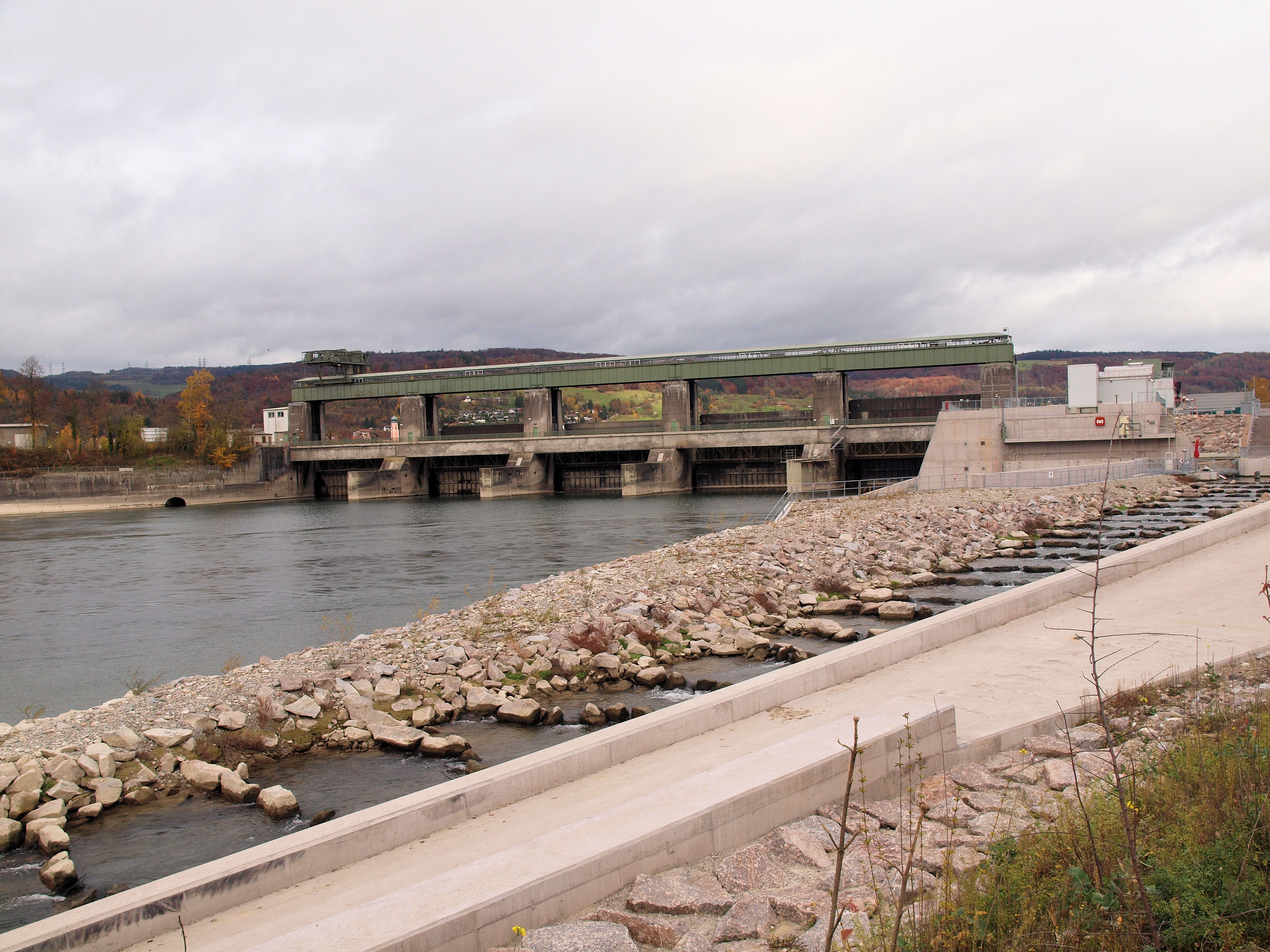 Wasserkraftwerk Albbruck-Dogern Stauwerk